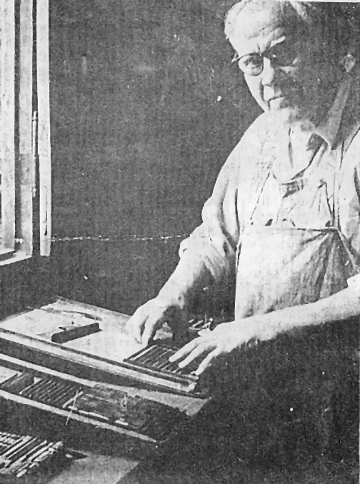 Juan Czajkowski trabajando en la edición del periódico "OREDOWNIK" hacia 1969 en su imprenta ubicada en la Av Mitre casi Junín de la Ciudad de Posadas, Misiones, Argentina.